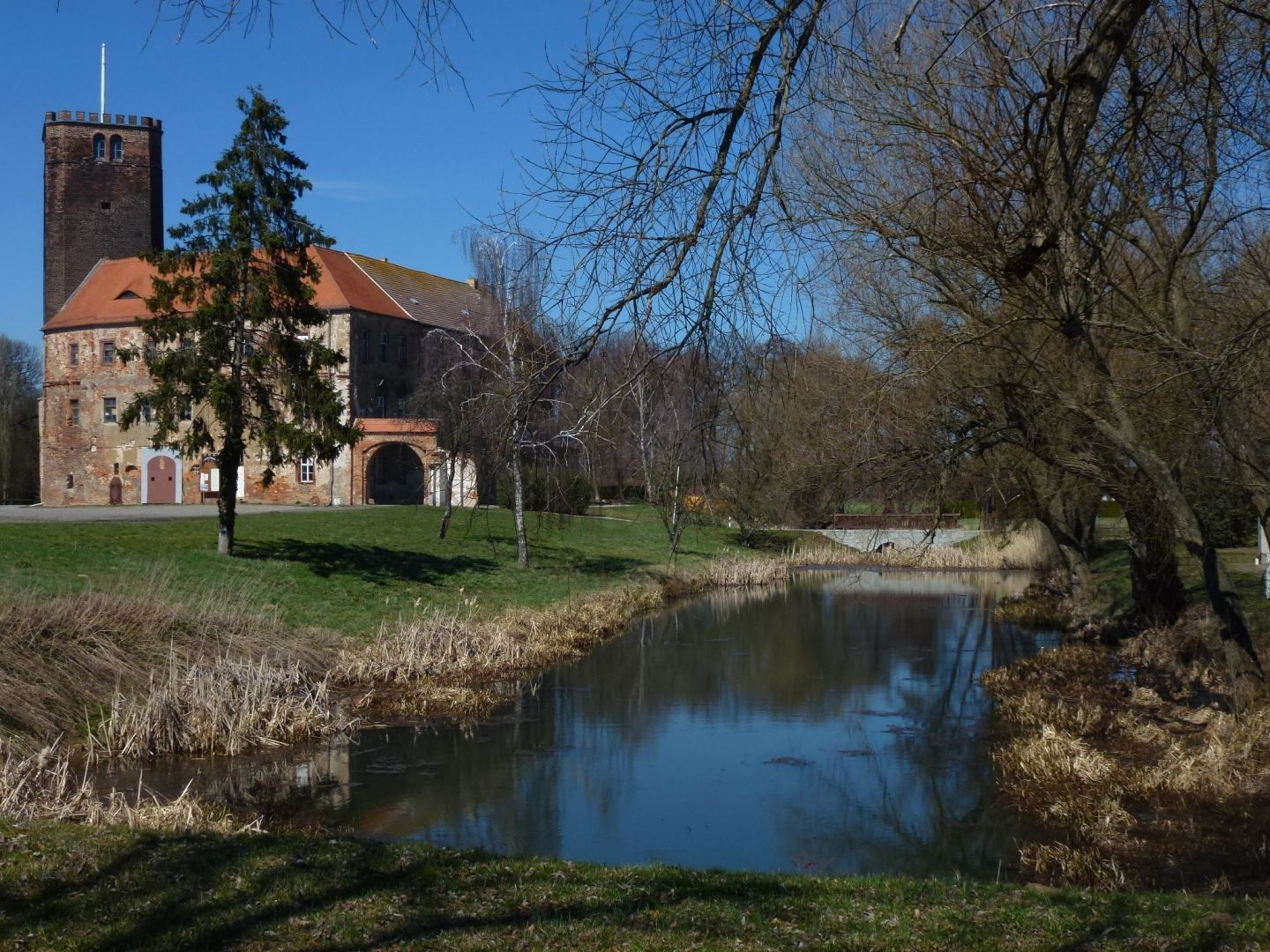 Wasserschloss Schnaditz